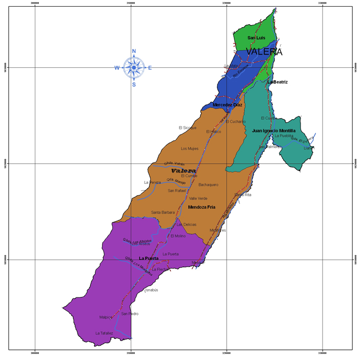 Valera